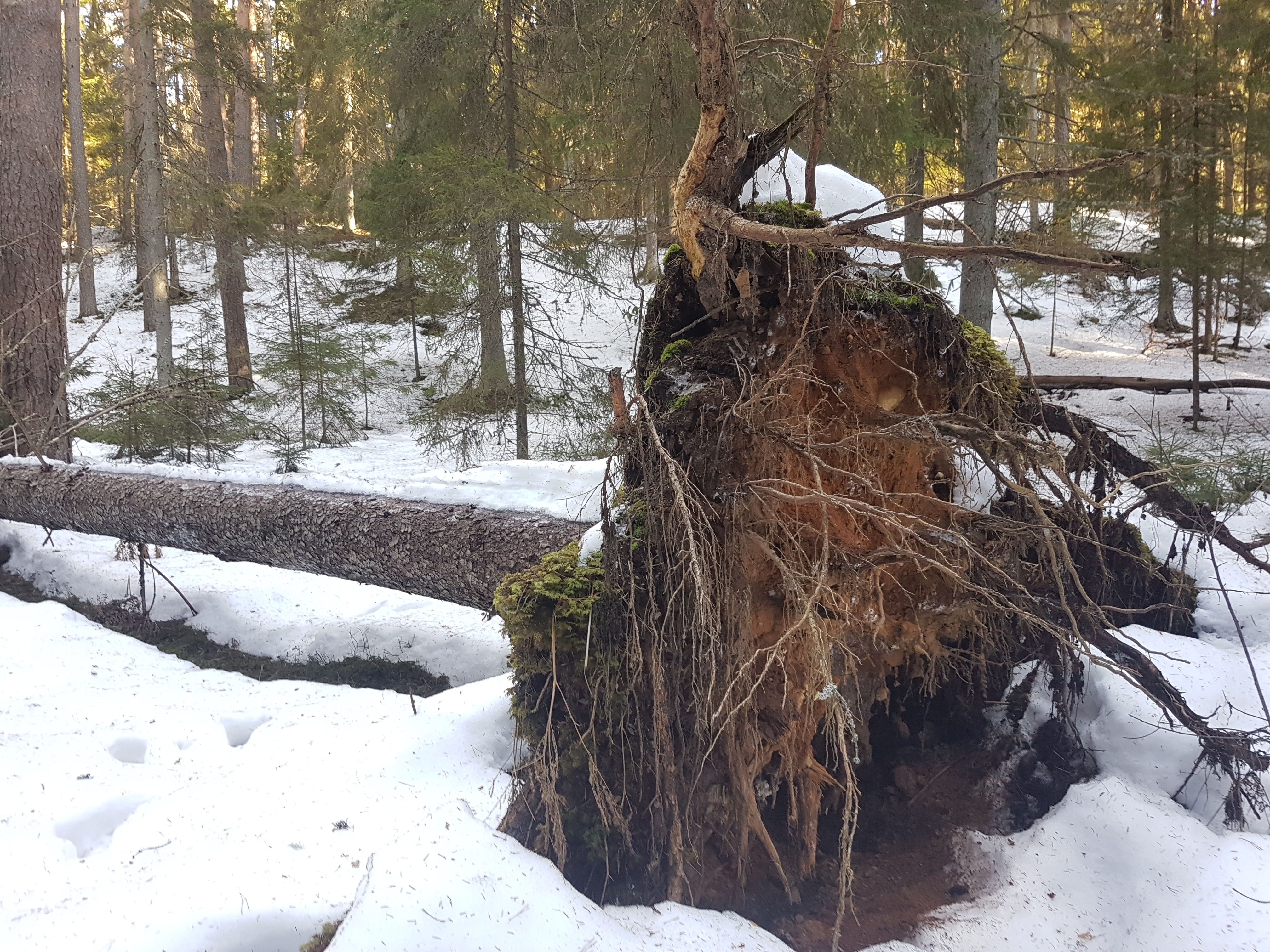 Tuuleheite tagajärjel ümber kukkunud kuusk taevaskojas.